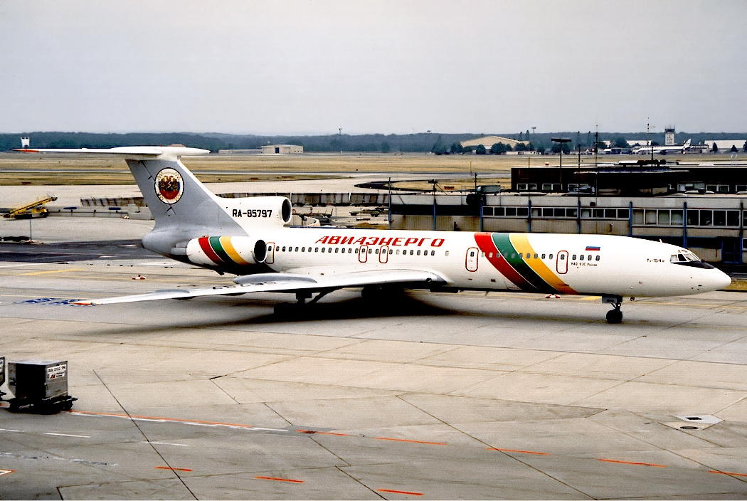 Aviaenergo Tupolev Tu-154M